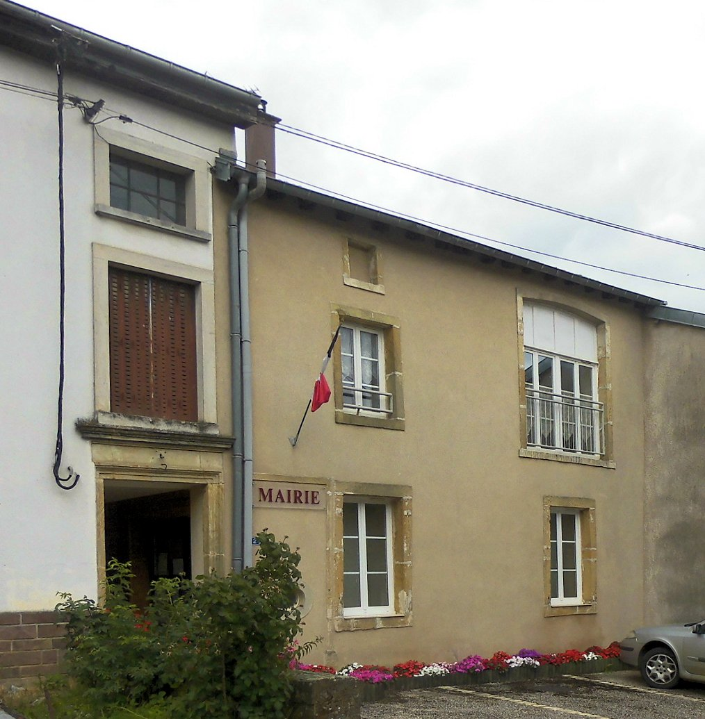 La mairie d'Urville